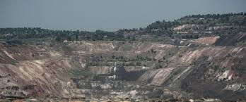 Эвгеосинклиналь